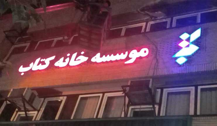 موسسه خانه کتای ایران